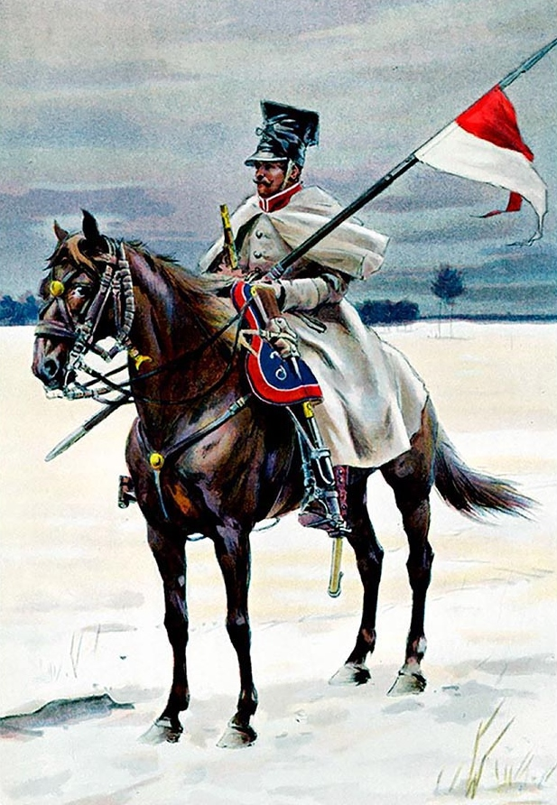 Lancier polonais de la Garde en tenue d'hiver.